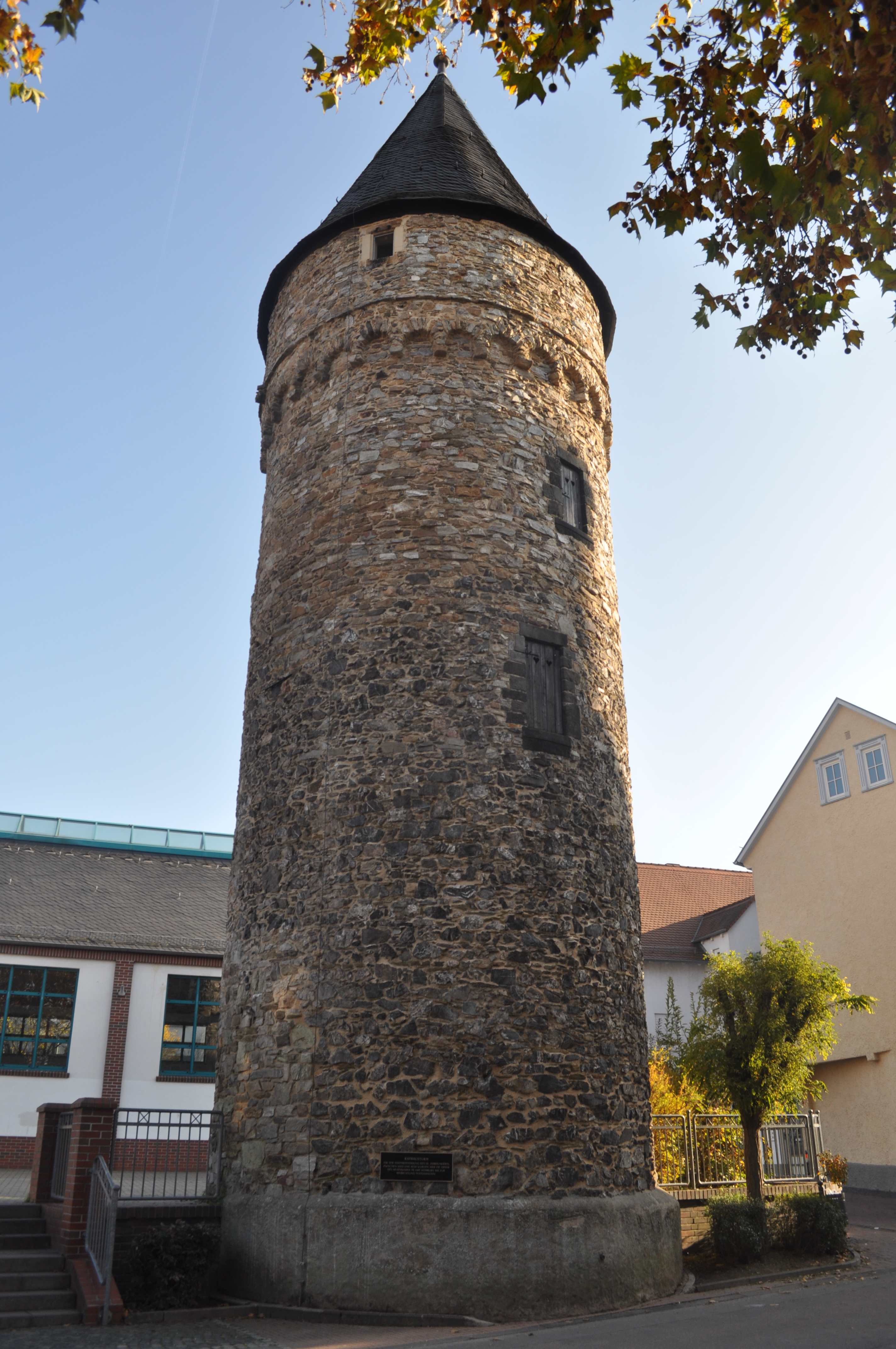 Rathausturm in Bad Homburg. Der Rathausturm ist Teil der Stadtbefestigung des 14. Jahrhunderts.